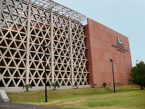 Rectoría de la UAM.